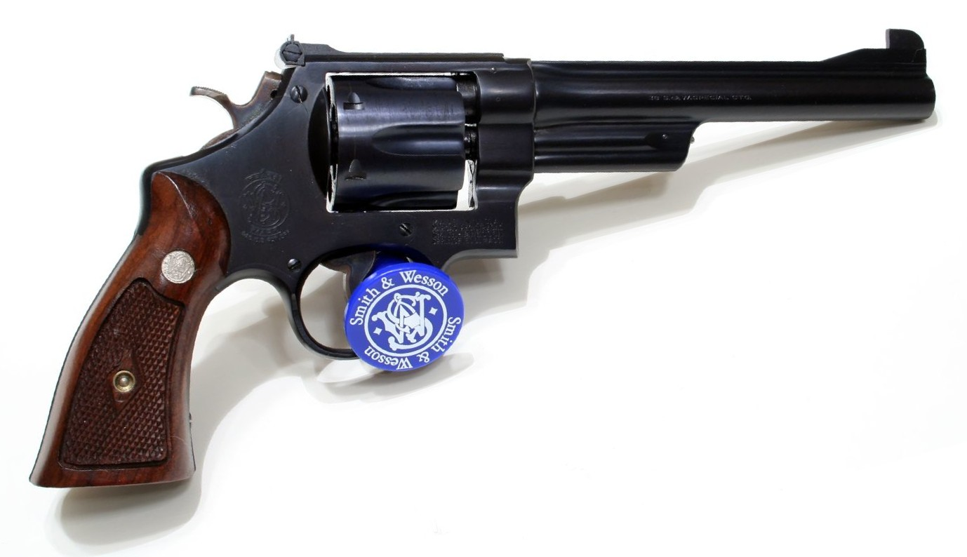 S&W Pre Model 23